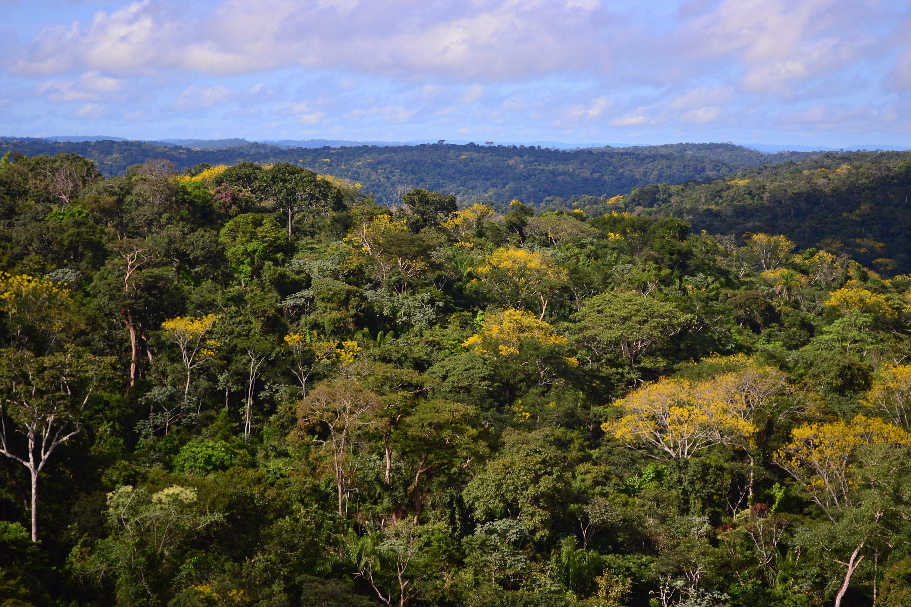 Sobrevoo na Floresta Amazônica em Novo Progresso, Pará. Foto: Vinícius Mendonça - Ascom/Ibama.